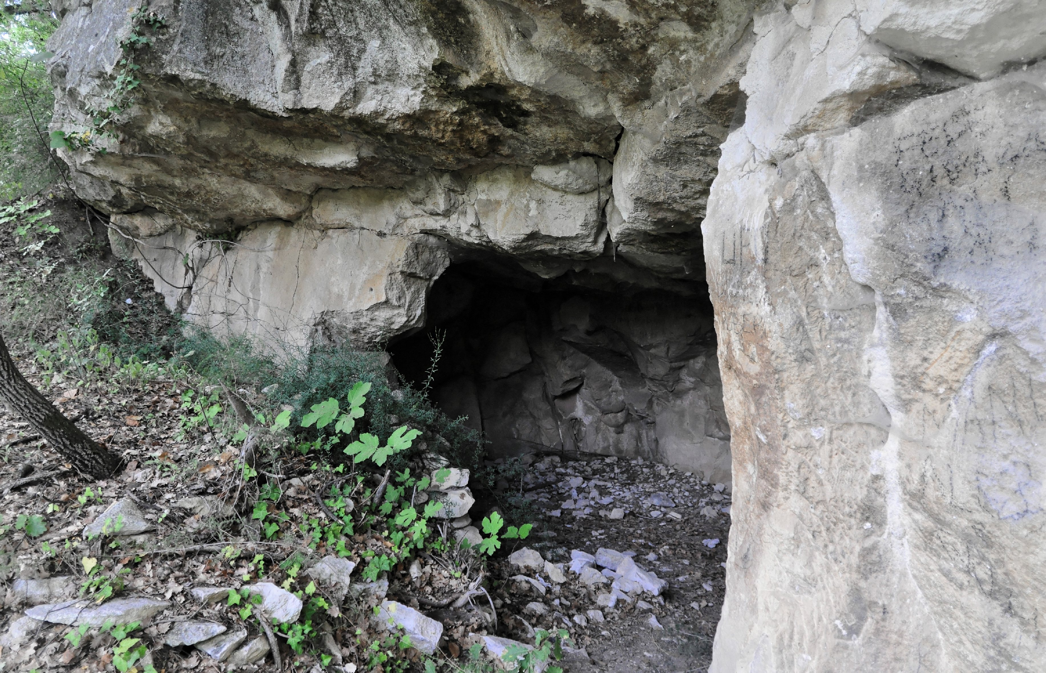 Valle dell'Orta 2013